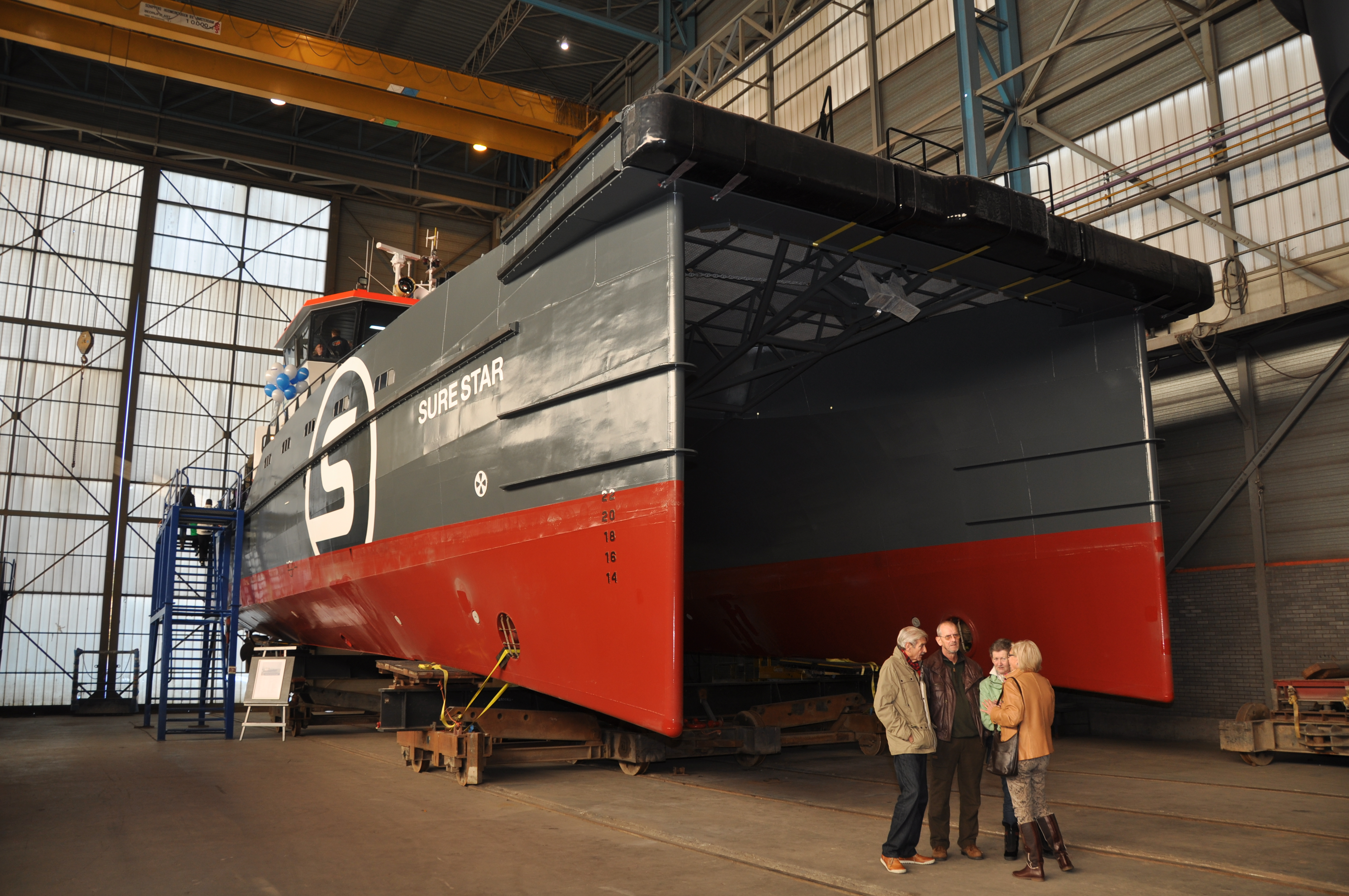 De SURE STAR nog in de afbouwhal bij Damen in Gorinchem tijdens de open dag.